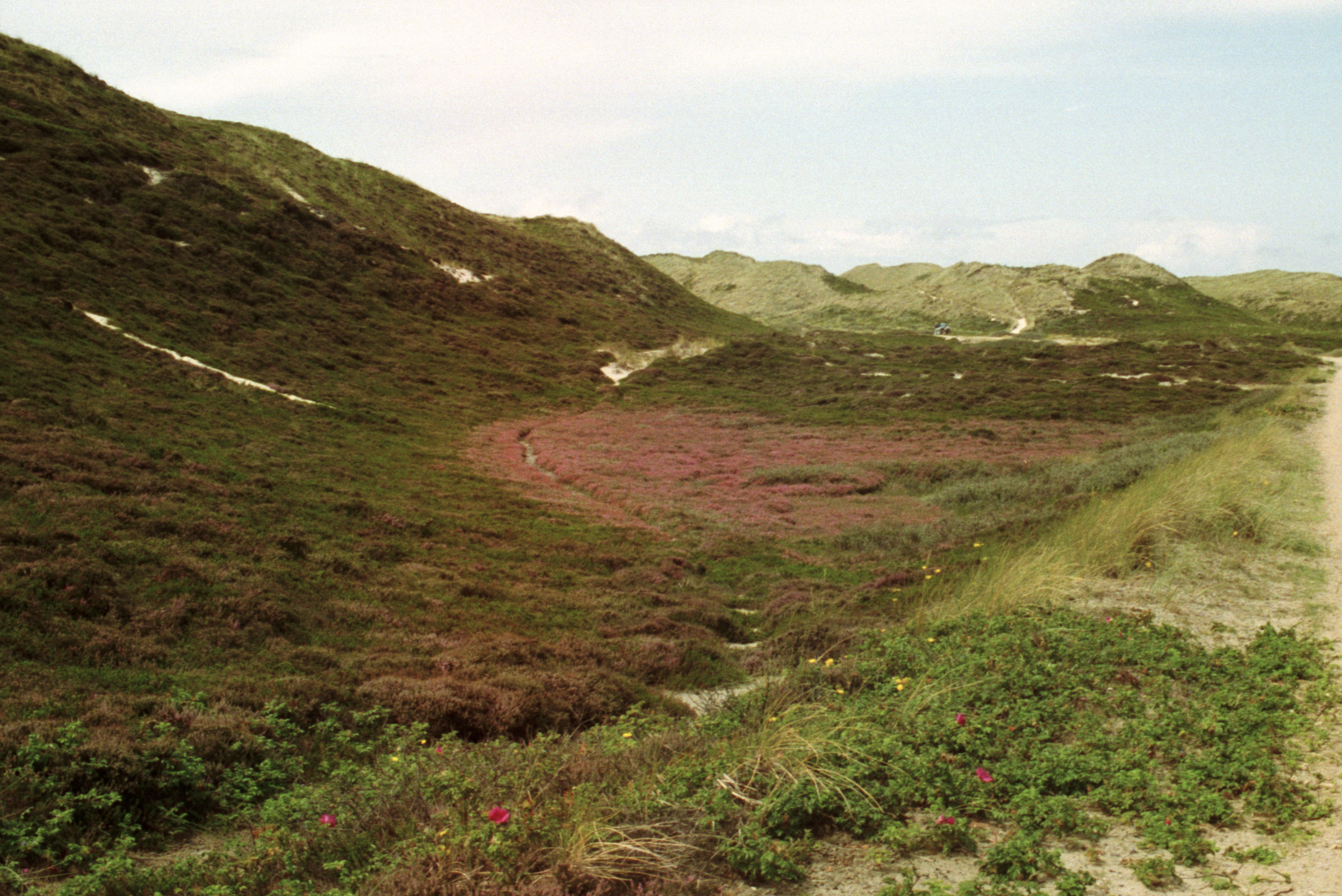 Rømø - Dünenlandschaft im westlichen Inselteil